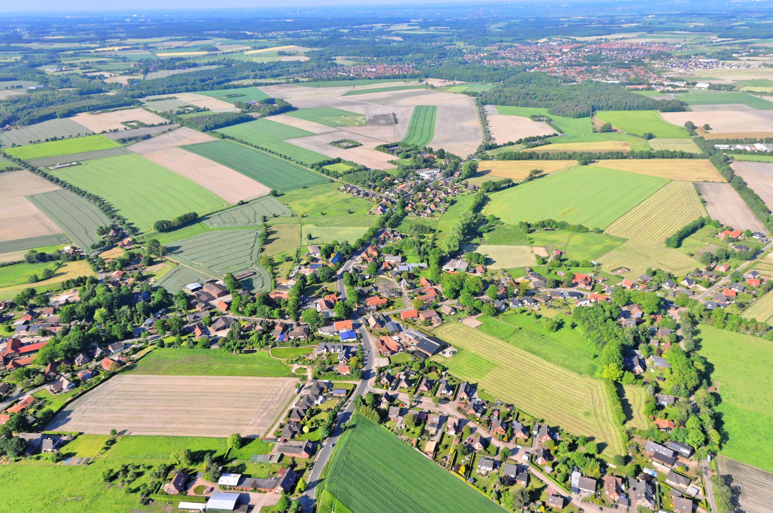 Überführungsflug vom Flugplatz Nordholz-Spieka über Lüneburg, Potsdam zum Flugplatz Schwarzheide-Schipkau